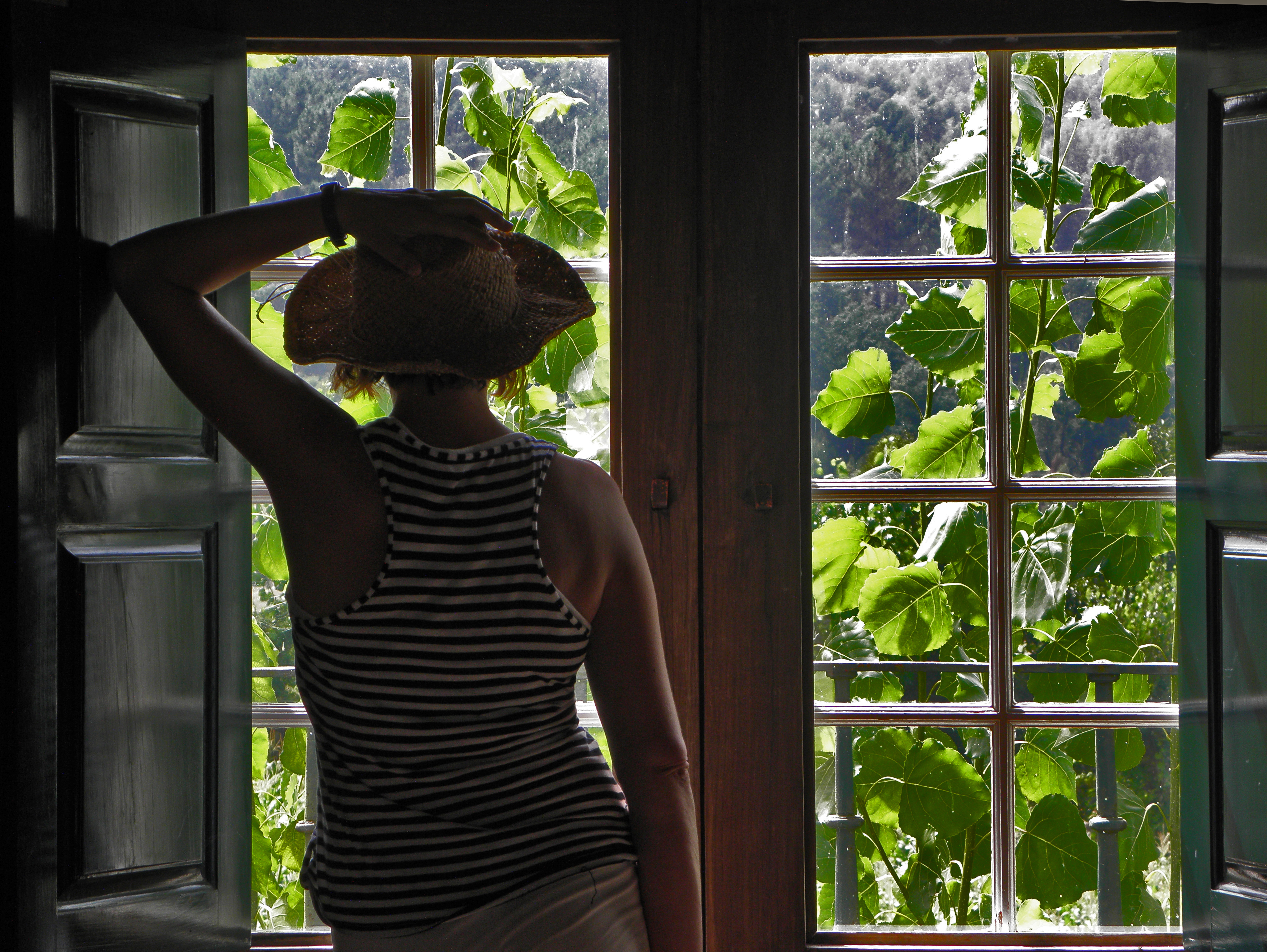 Beleza na fiestra